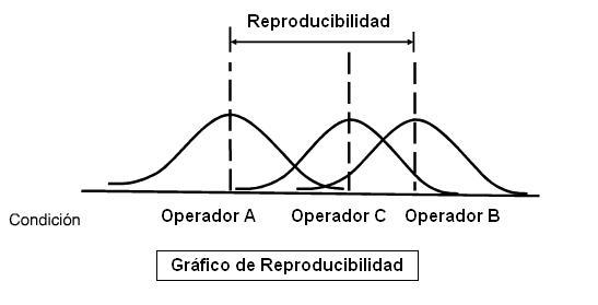 Gráfico de Reproducibilidad